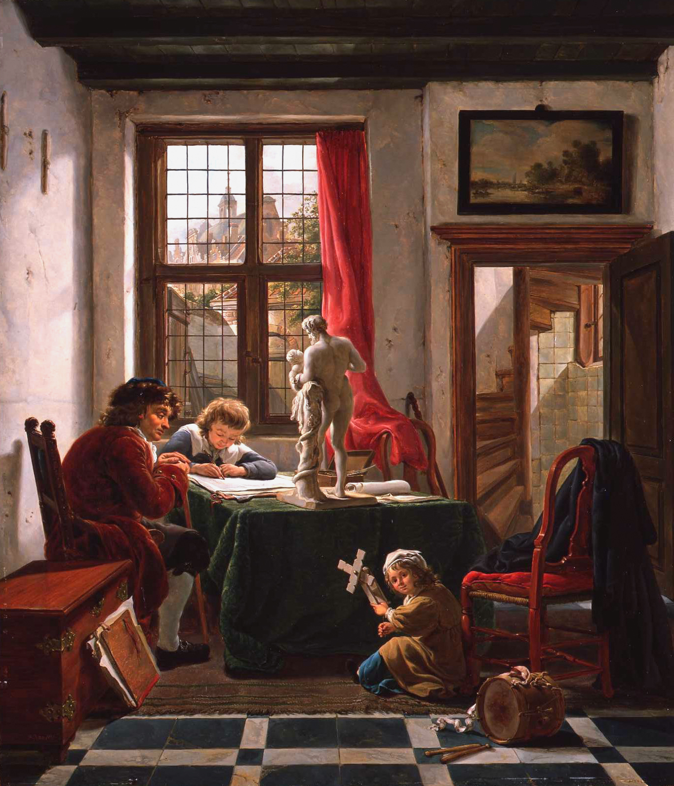 Drawing lesson